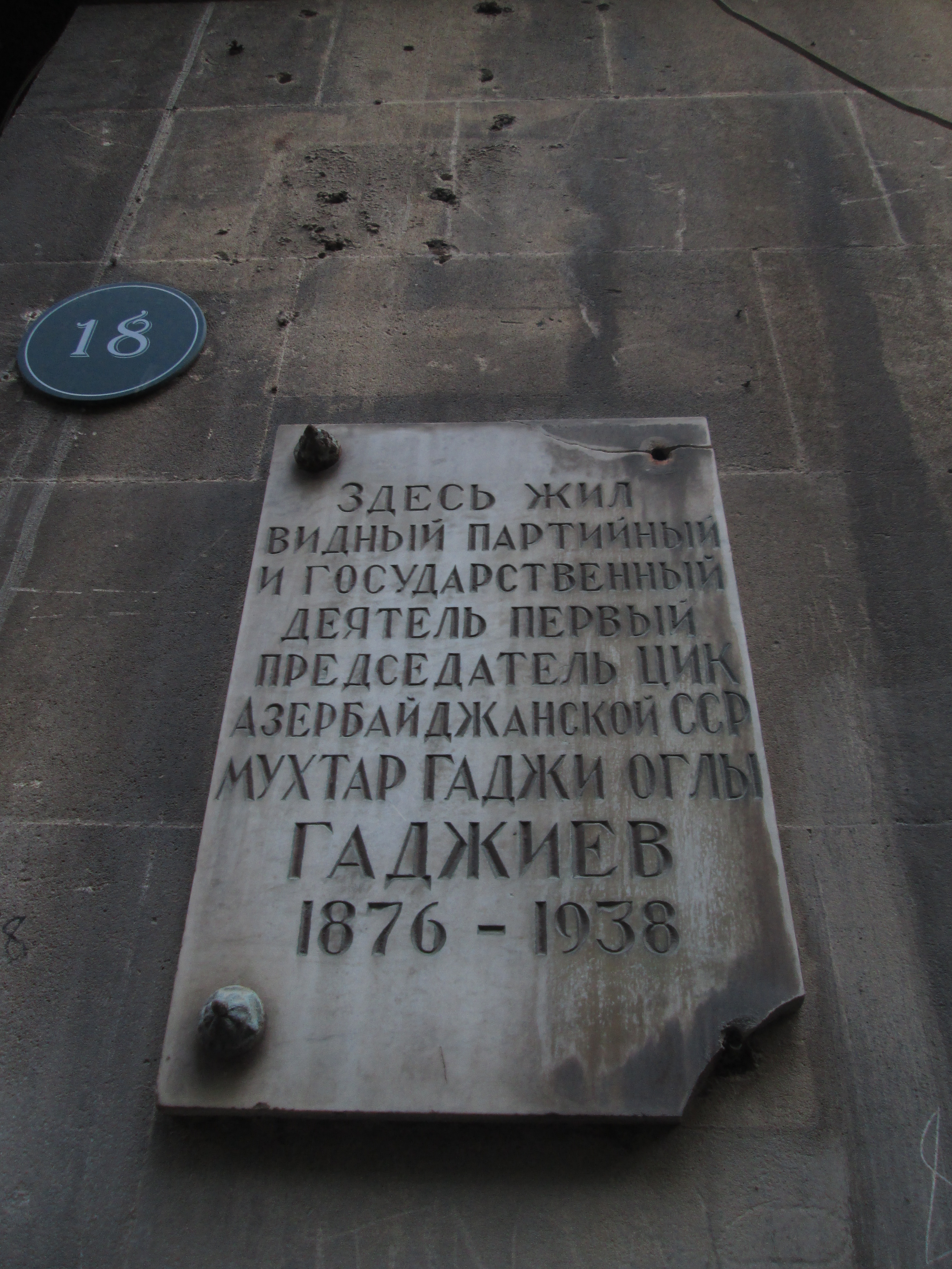 Muxtar Hacıyevin rusca xatirə lövhəsi